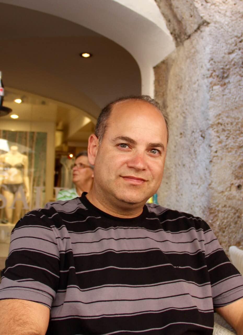 רון קפלן